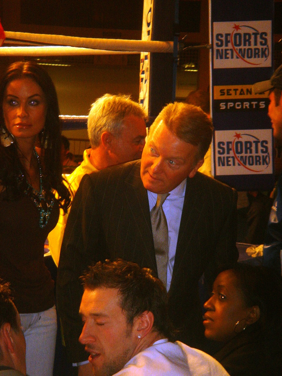 Frank Warren